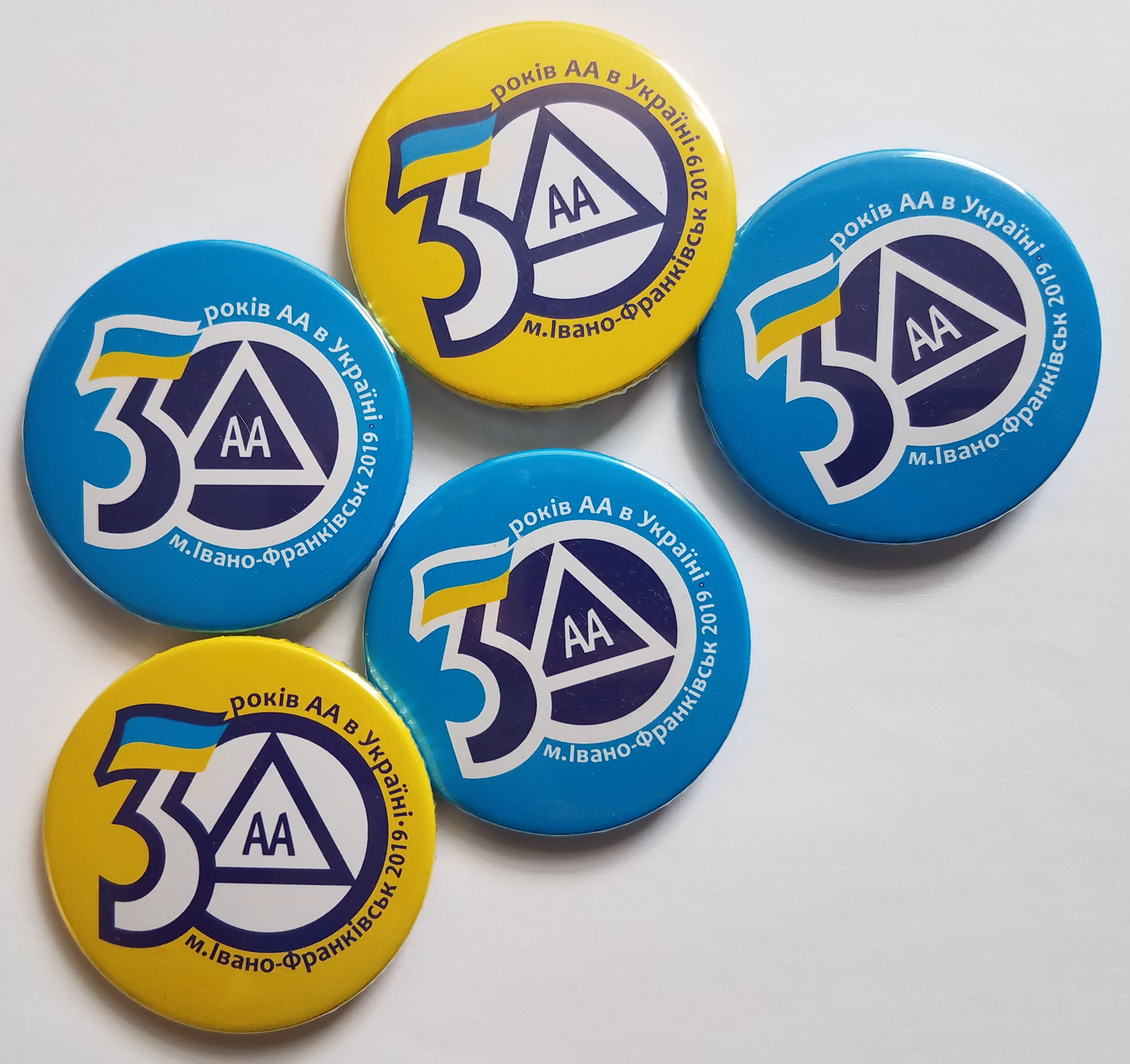 Емблема святкування 30-ти ліття Анонімних Алкоголіків в Україні